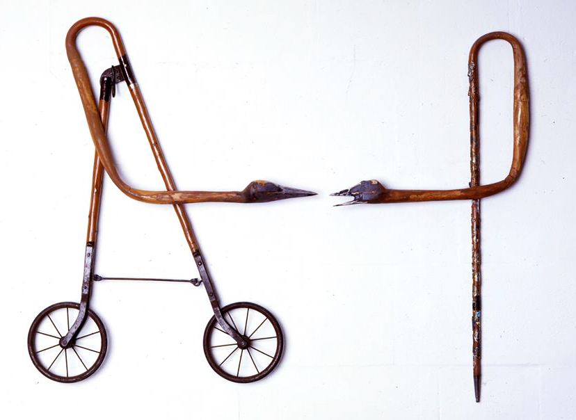 Objekt "Alte Begegnung" von Michael Schulze